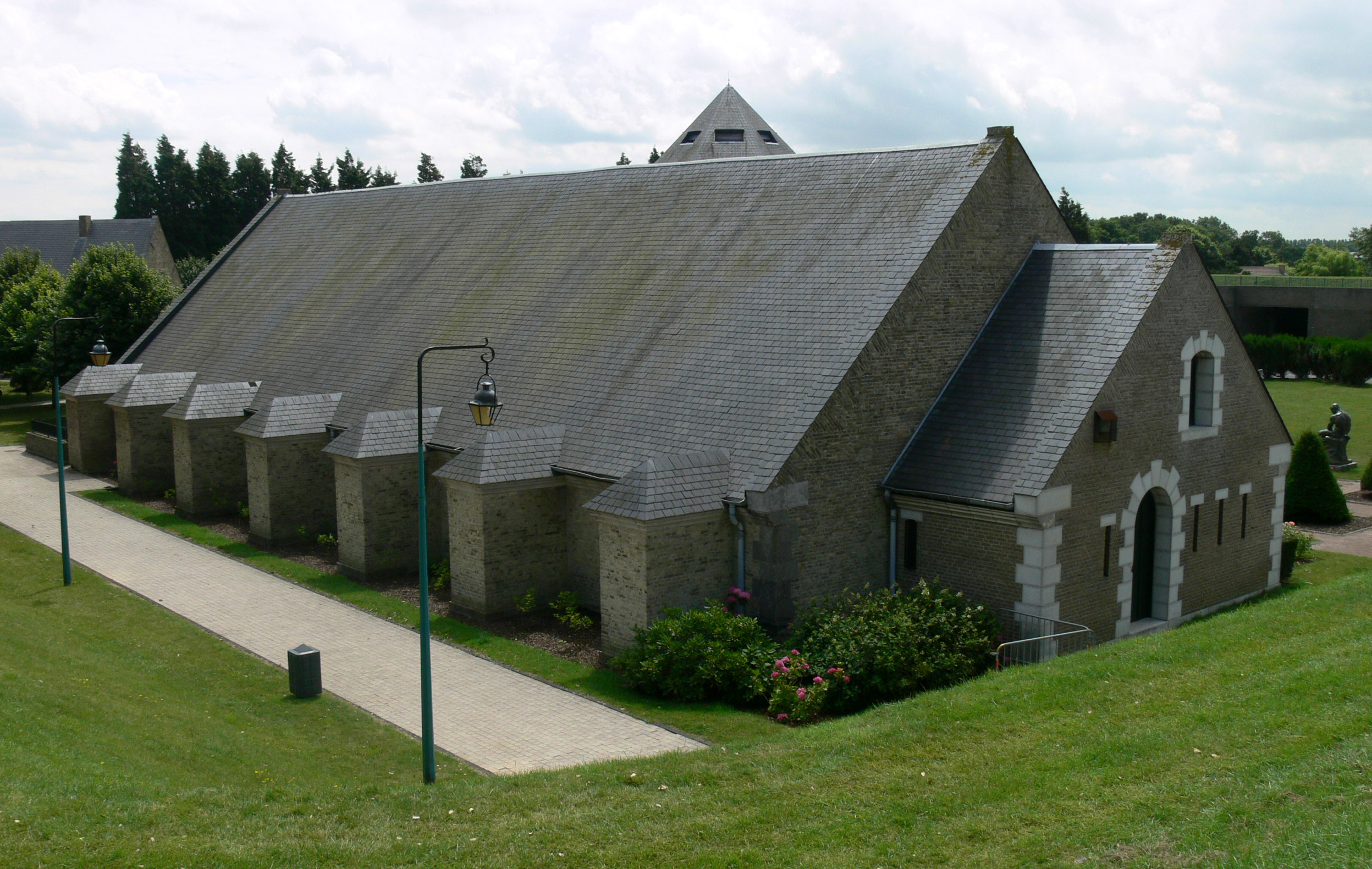 Poudrière de Gravelines